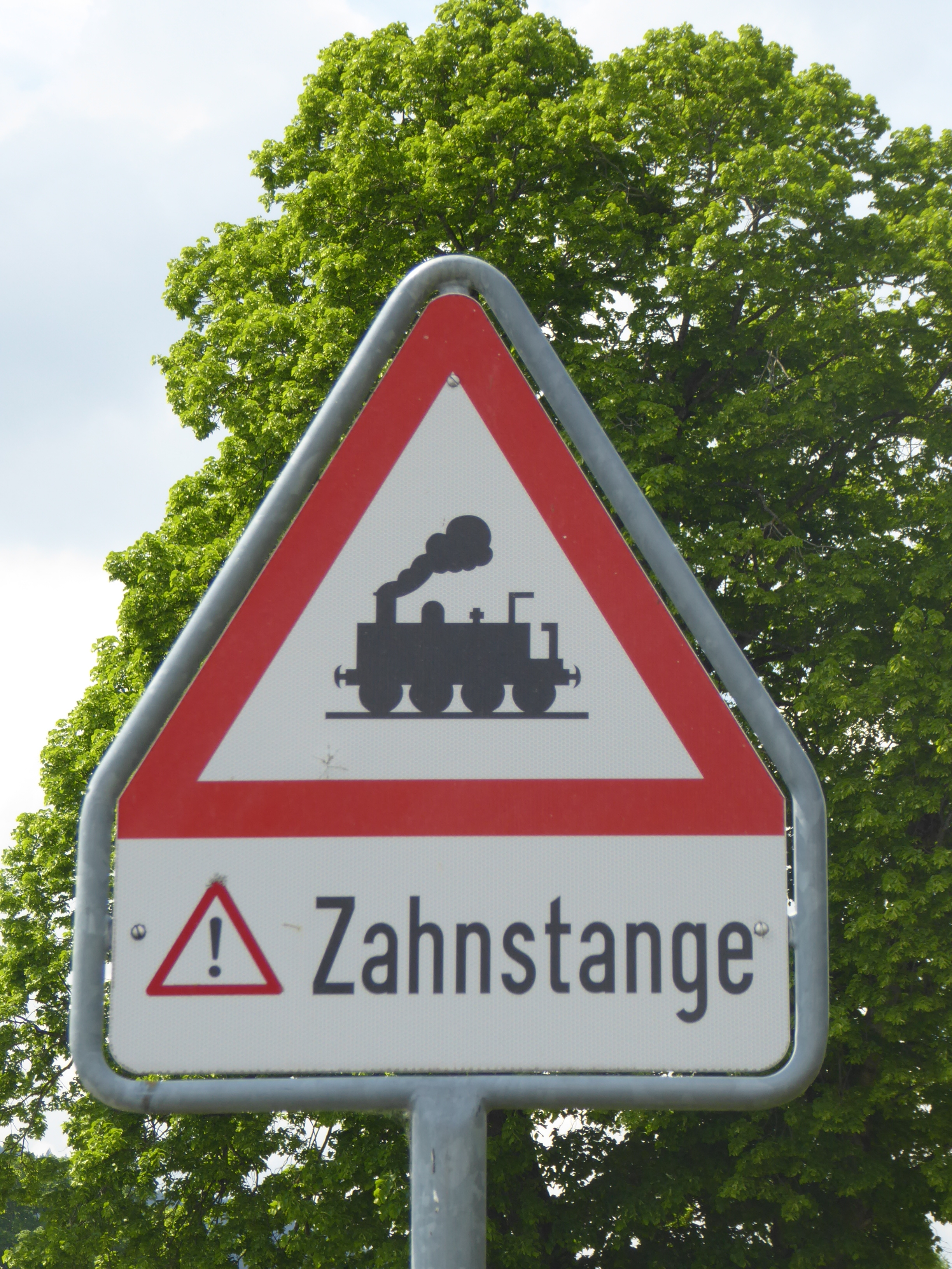 Straßenschild für Bahnübergang mit Zahnstange, die die Schienenkante übersteigt.